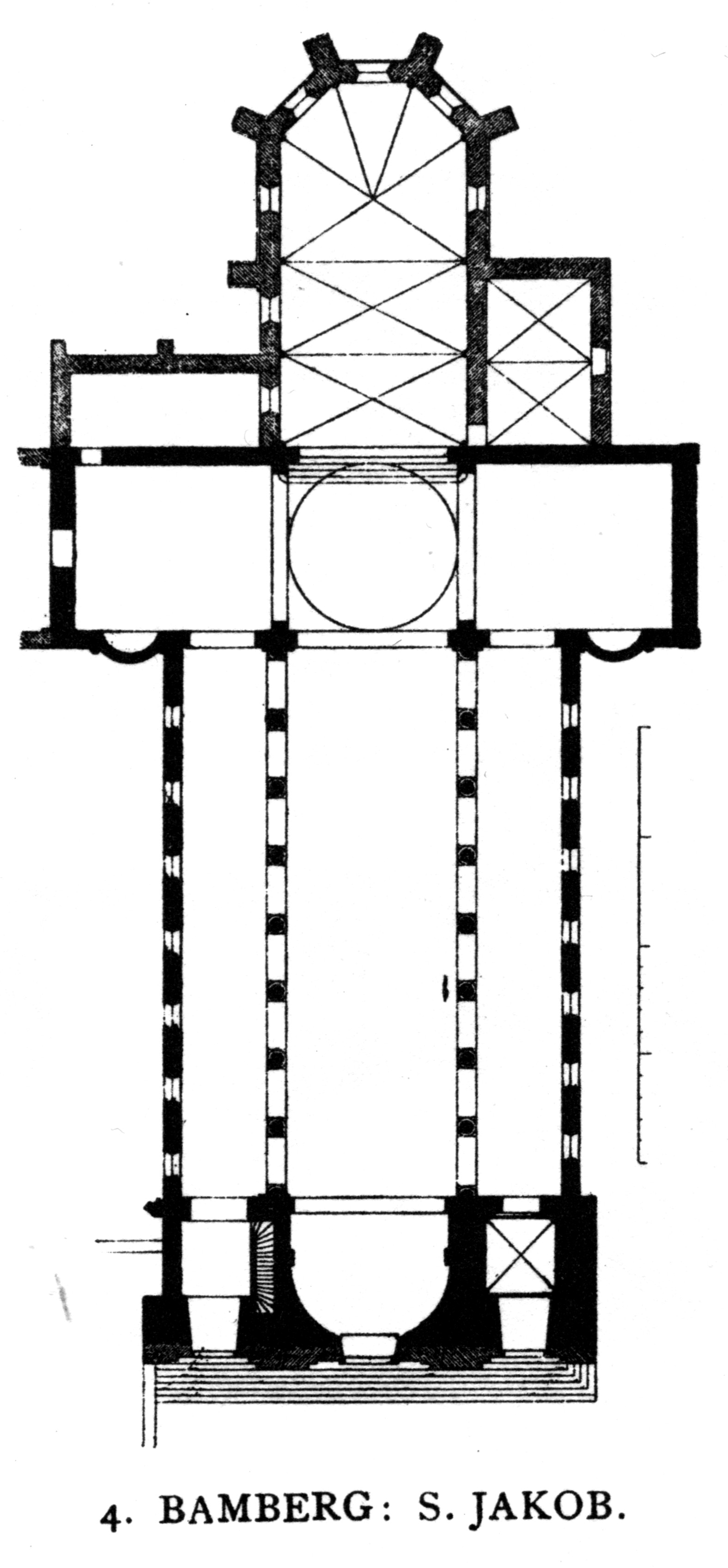 Bamberg, St. Jakob, floor plan.